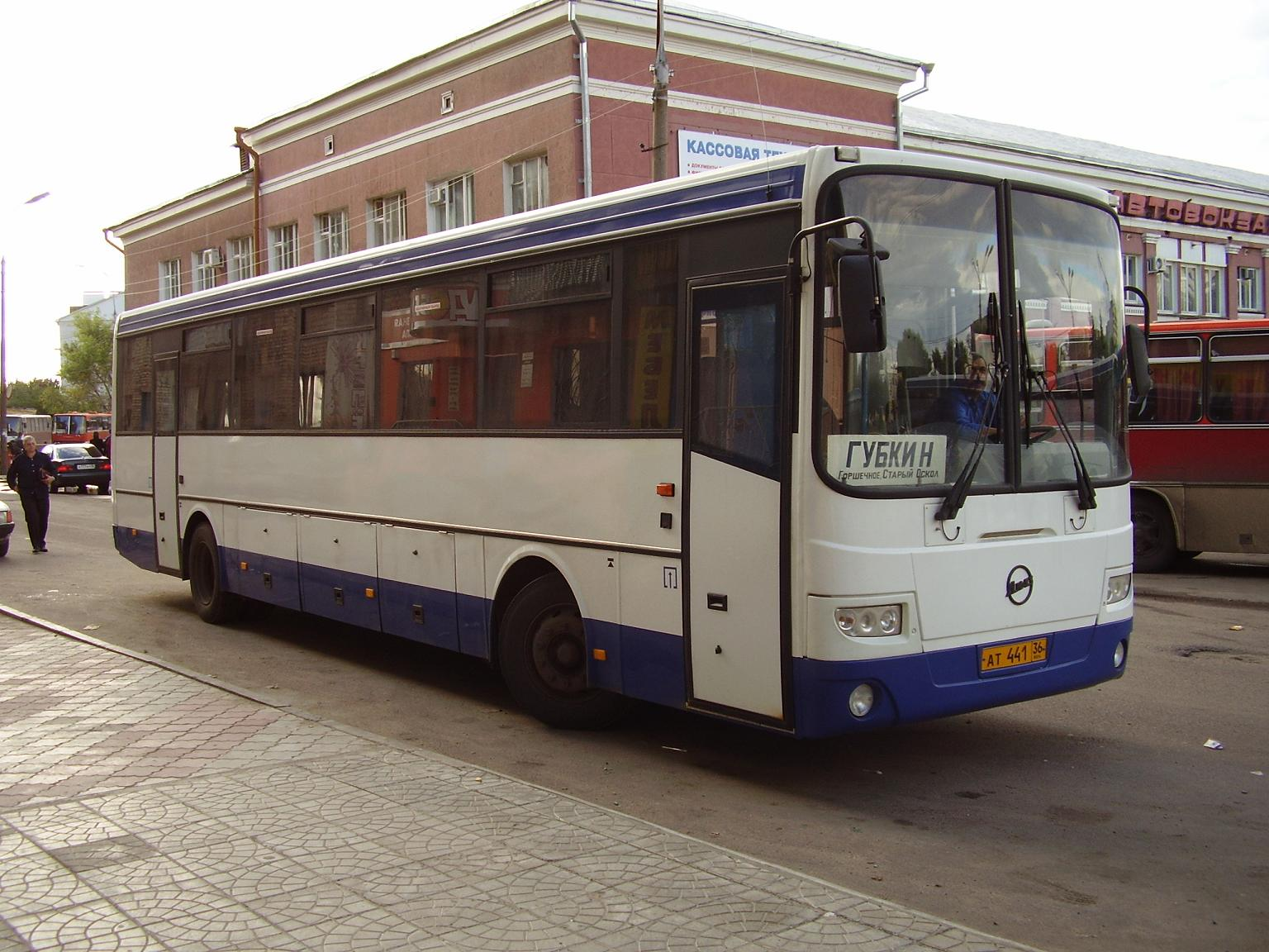 Междугородный автобус ГолАЗ-ЛиАЗ 5256.33 сборки Голицинского автозавода